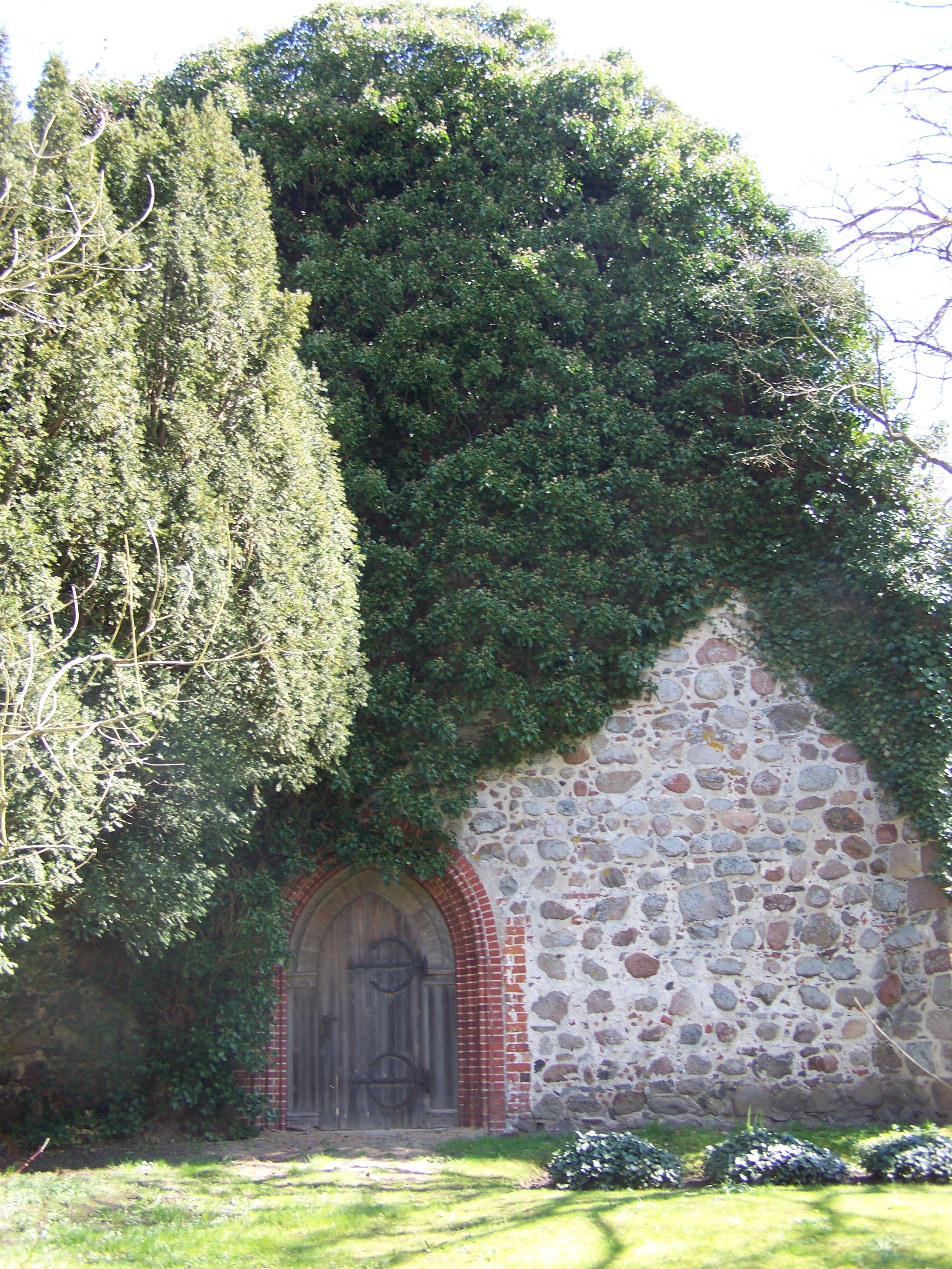 Roloffshagen, Kirchenruine - Portal (2008-04-20)